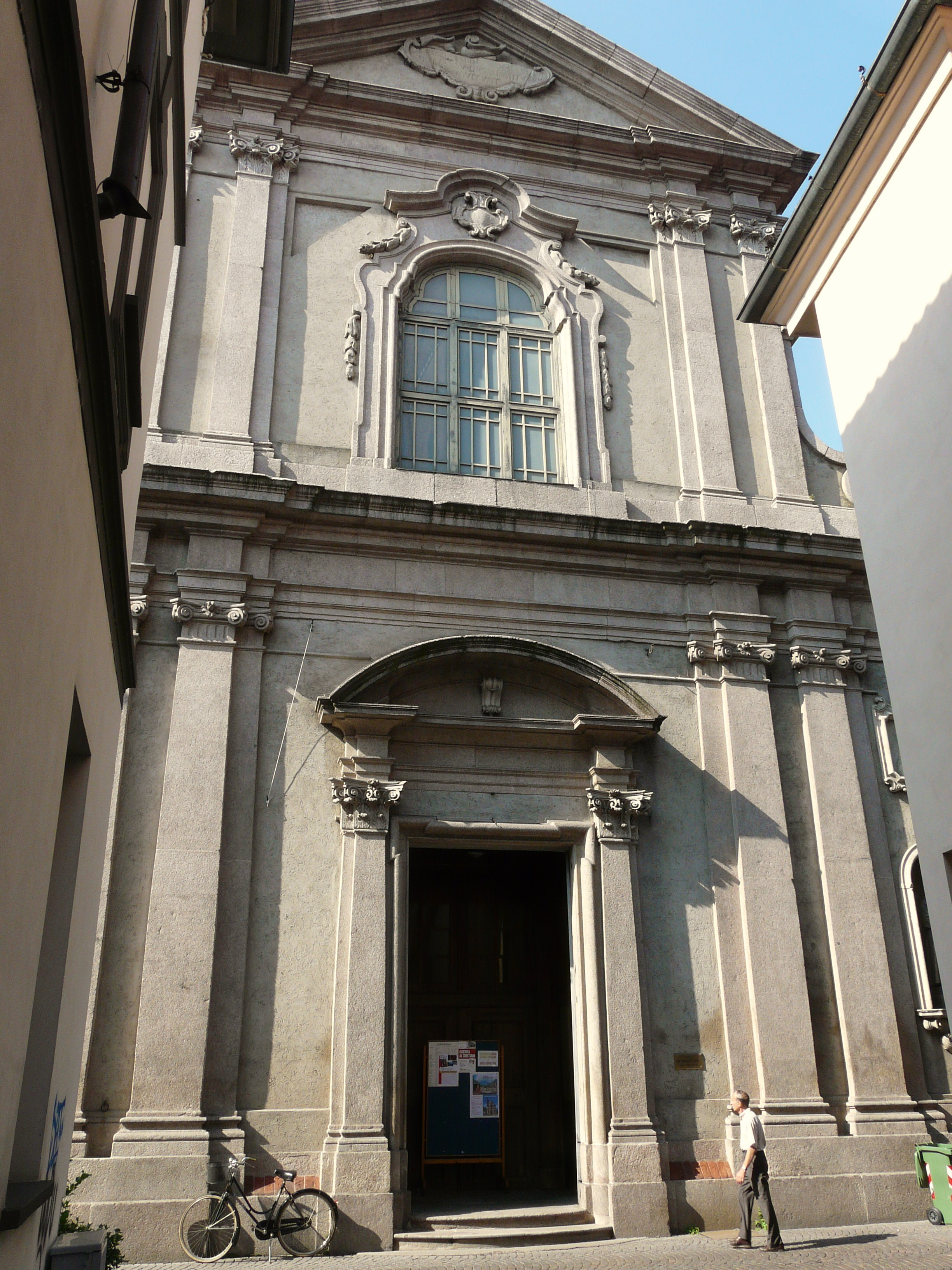 Chiesa di San Bernardino da Siena, Abbiategrasso, Lombardia, Italia